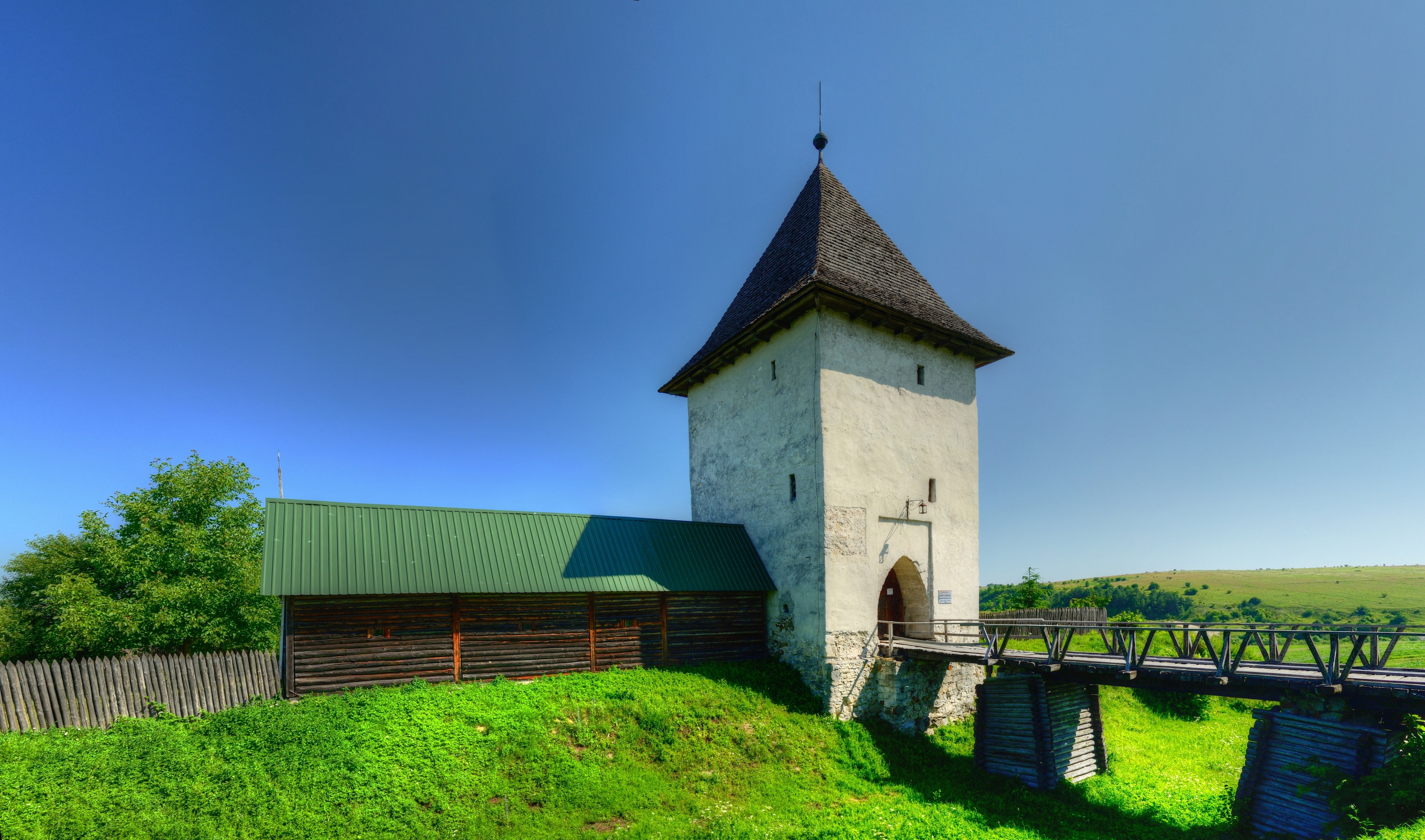 Вежа XIV ст